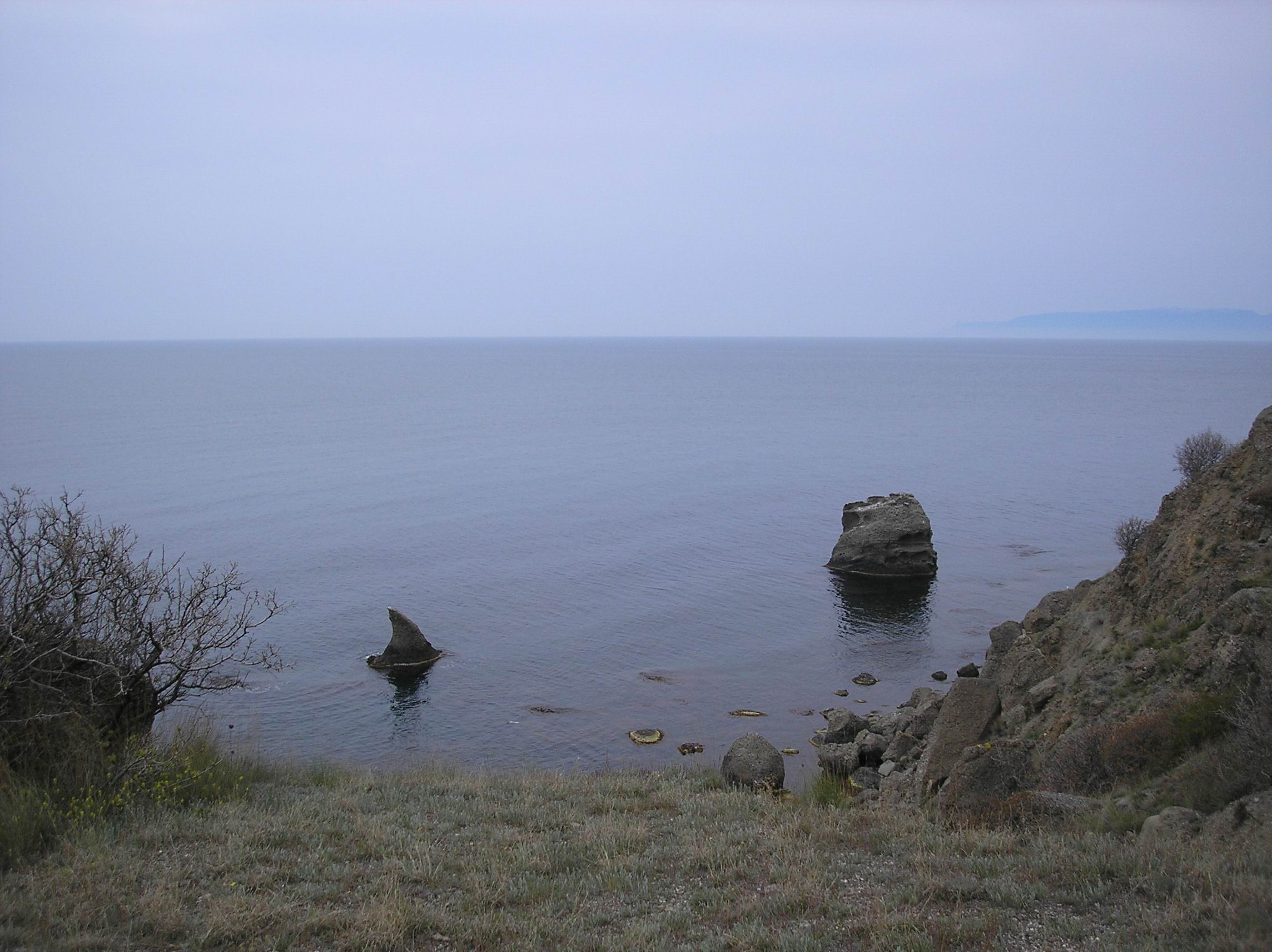 Meganom cape. Crimea. Мис Меганом, Крим